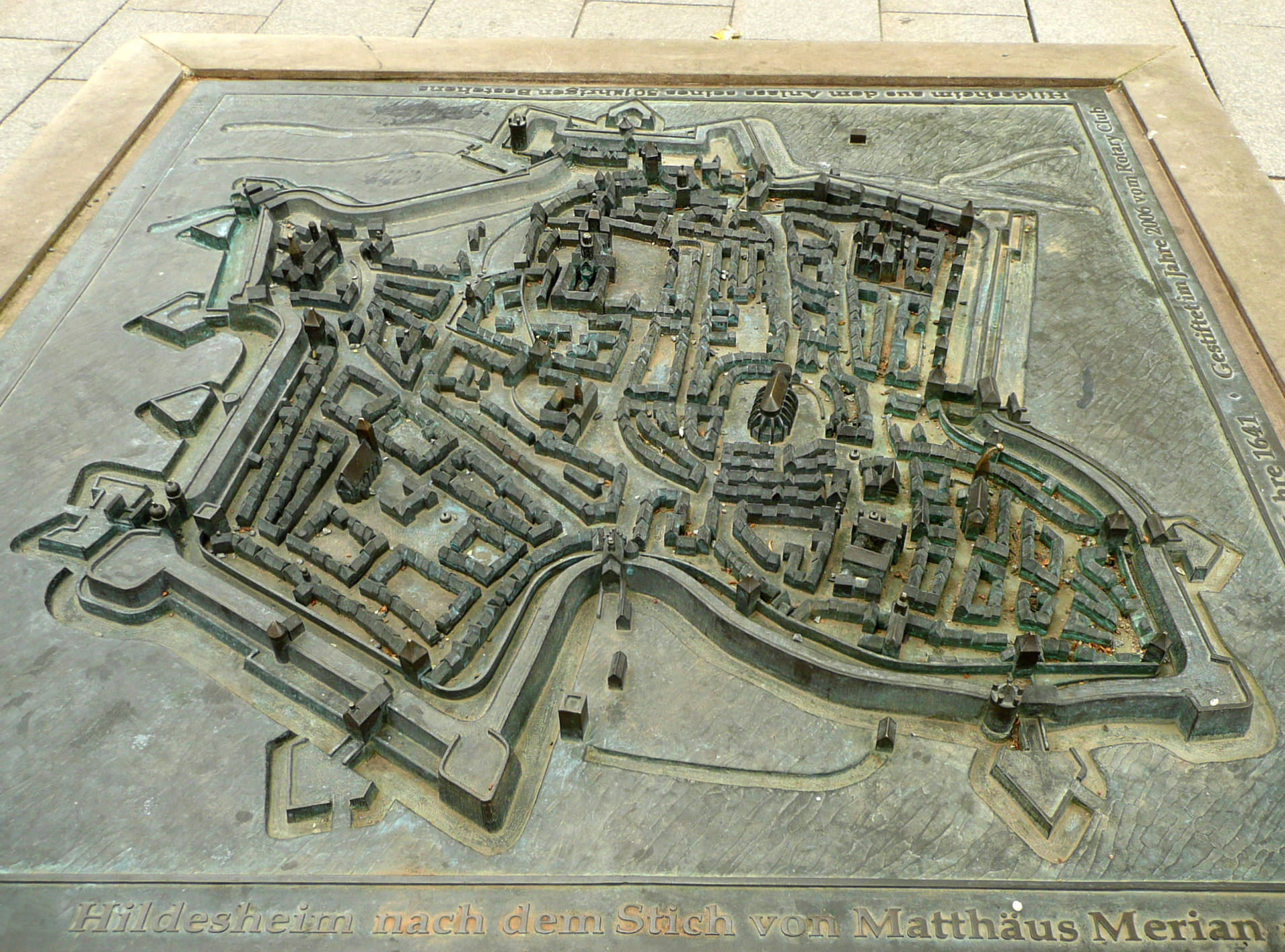 Stadtbild von Hildesheim im 17.Jahrhundert nach Vorlage von Merian, Skulptur in der Fußgängerzone